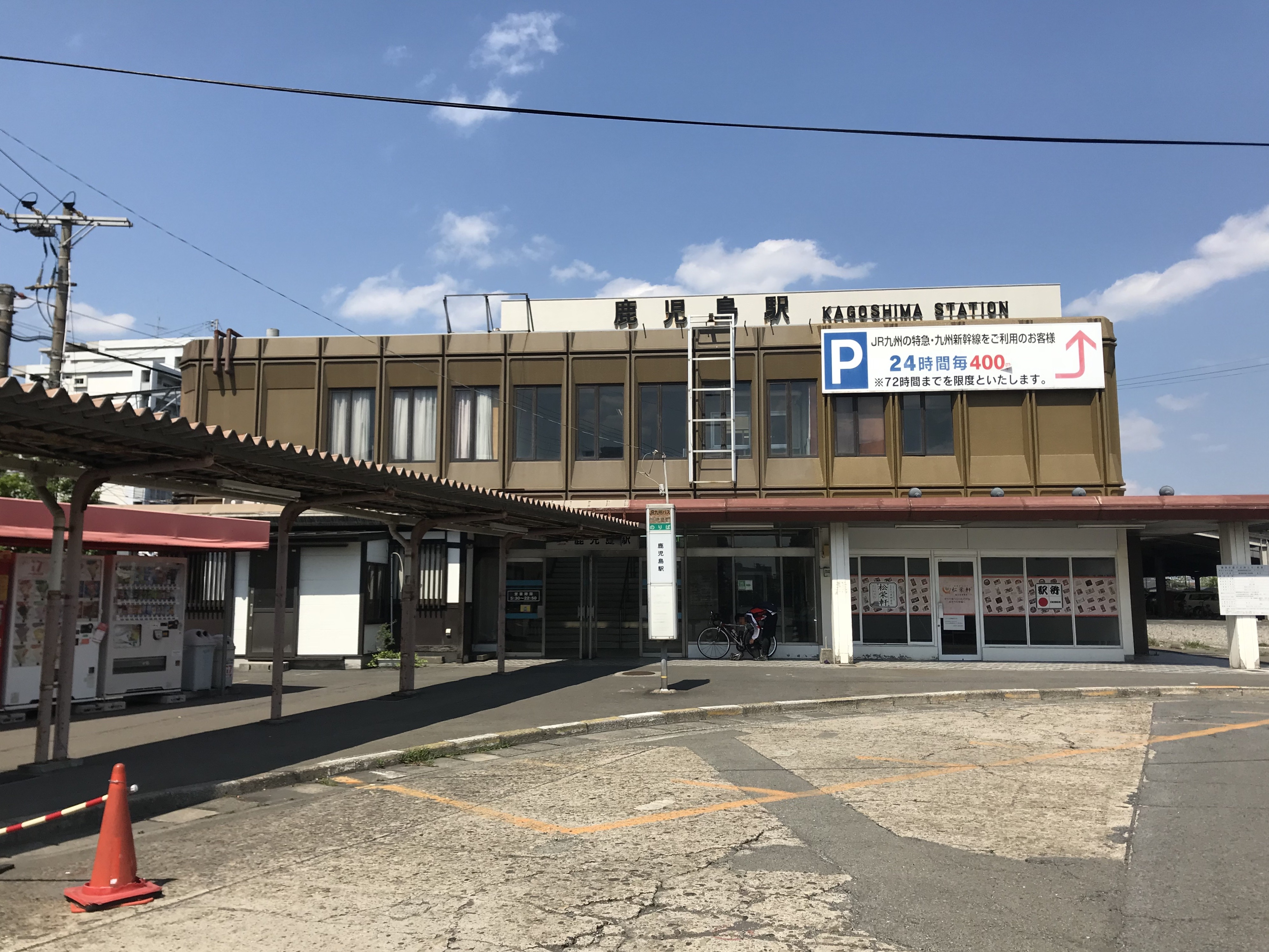 鹿児島駅の駅舎